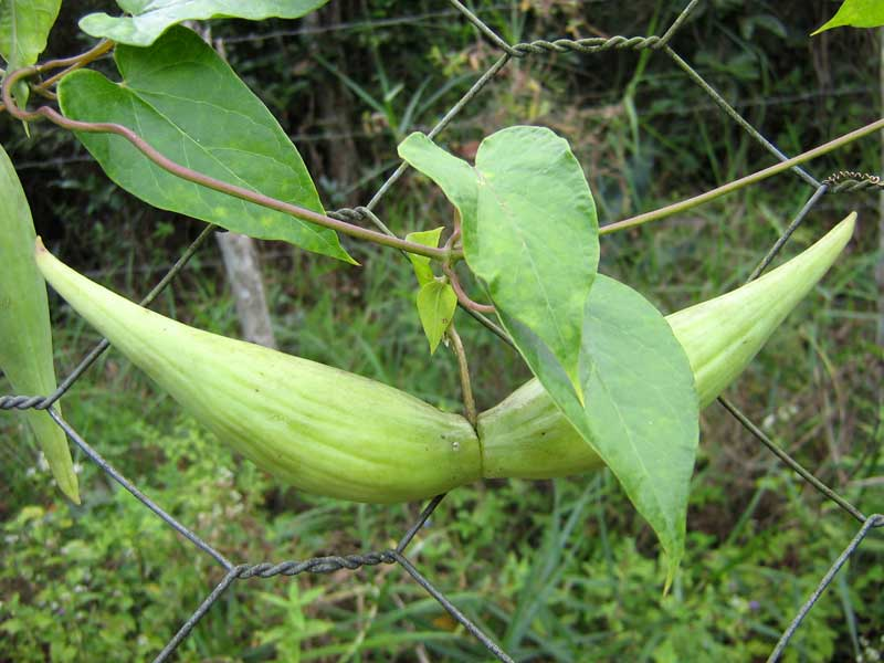 Oxypetalum harleyi (Fontella & Goyder) Farinaccio